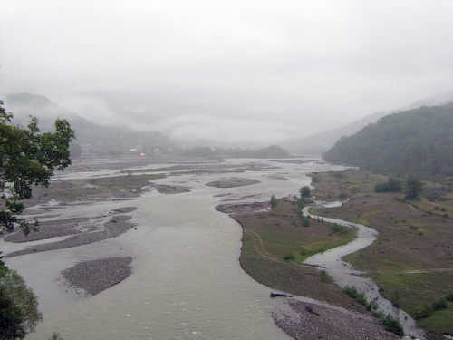 Вид на реку Шахе и аул Ахинтам